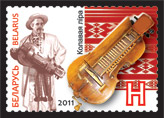 Марка «Колесная лира». Беларусь, 2011